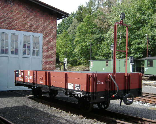 Otevřený nákladní vůz 97-19-67 Žitavské úzkorozchodné dráhy, který původně patřil Frýdlantským okresním drahám, na nádraží v Bertsdorfu